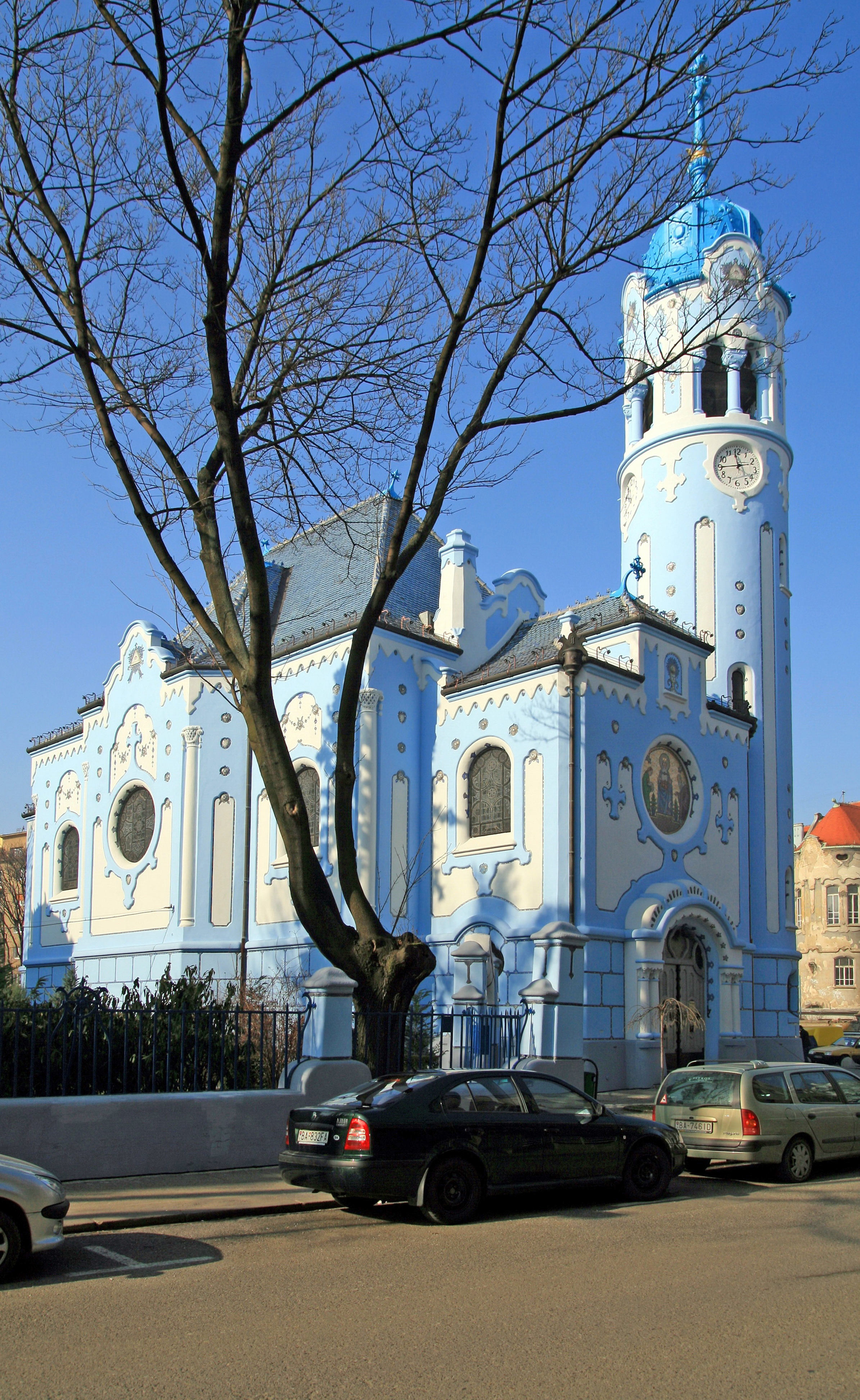 Bratislava, Modrý kostolik, Slovensko